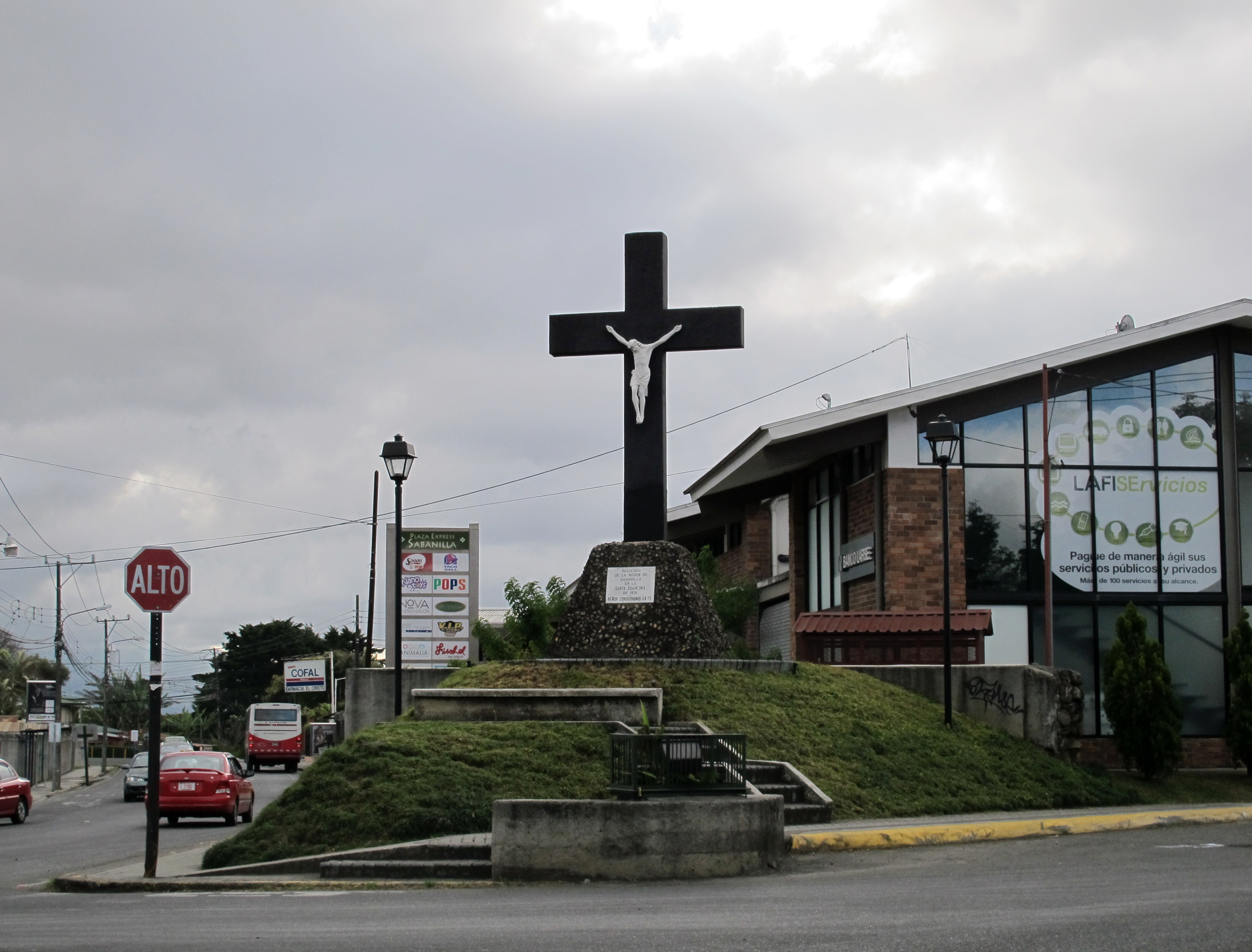 Norsk (bokmål): Cristo de Sabanilla i Sabanilla i kantonen Montes de Oca i Costa Rica